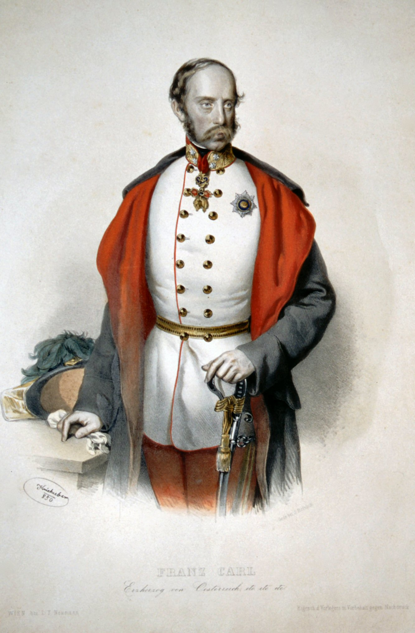 Franz Karl von Österreich (1802-1878), ERzherzog von Österreich, Vater des Kaisers Franz Joseph I.